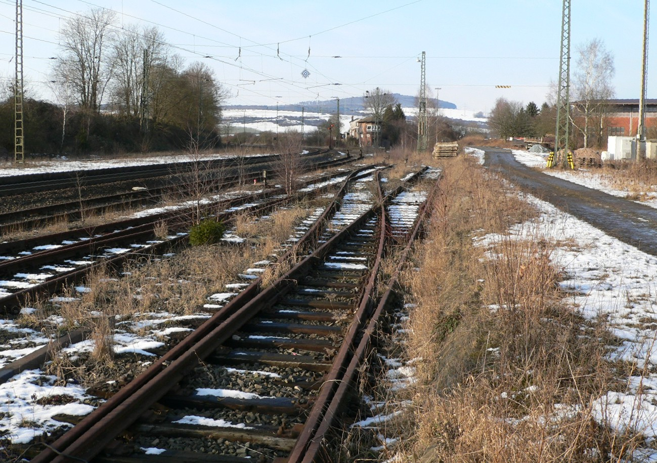 Ehemaliger Abzweig der Carlsbahn im Bahnhof Hümme Fotograf: selbst fotografiert Datum: 12.02.2006